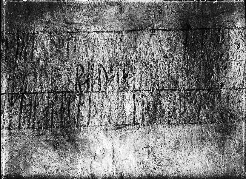 G119 Anga. Detalj av runinskrift från 1280-talet på långhusets norra mur. Kategori: (03) Kalkmålningar G119 Anga. Detalj av runinskrift från 1280-talet på långhusets norra mur.